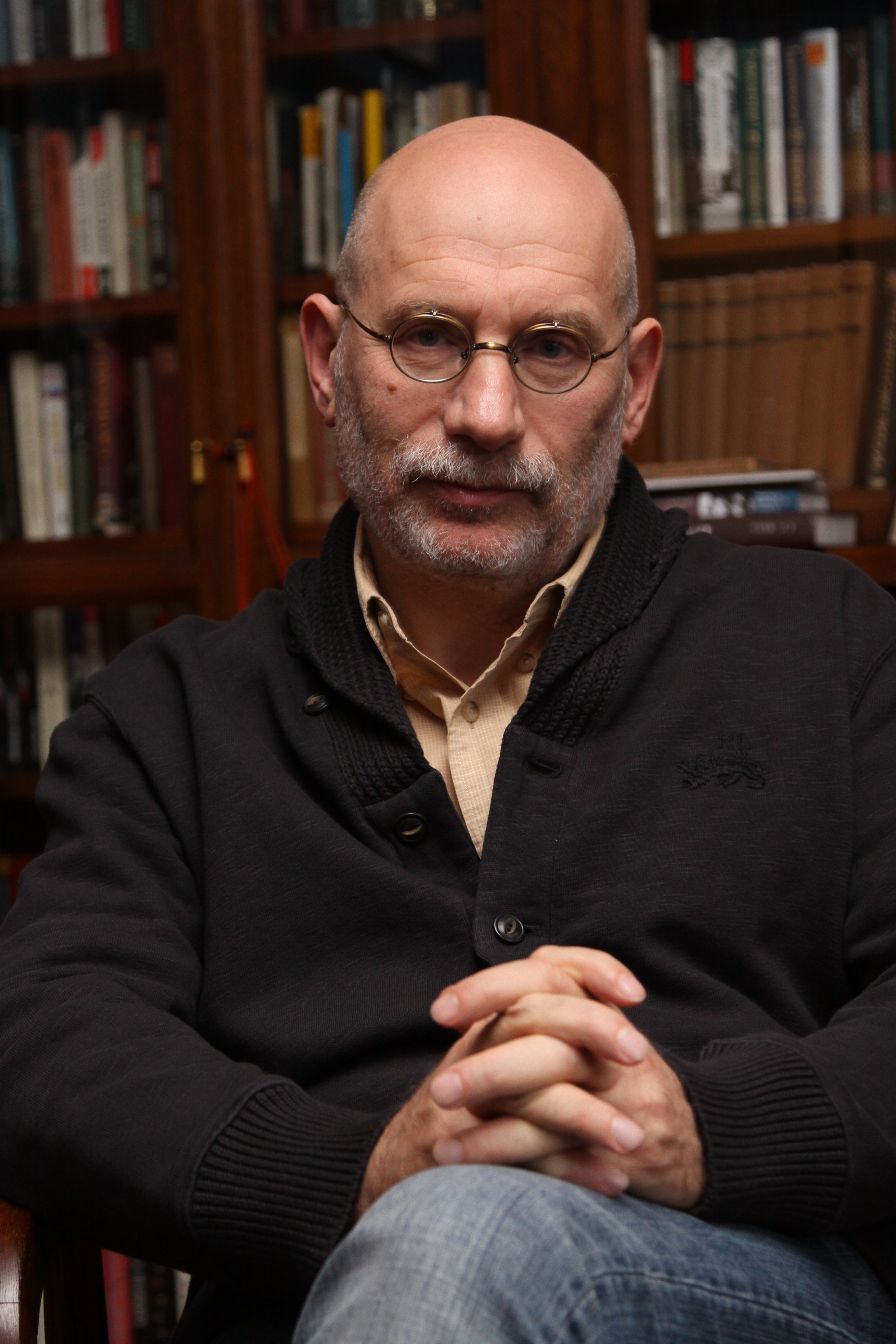 Борис Акунин